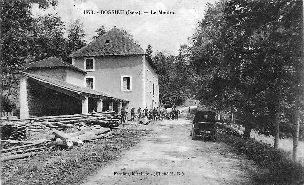 Bossieu (Isère) - Le Moulin